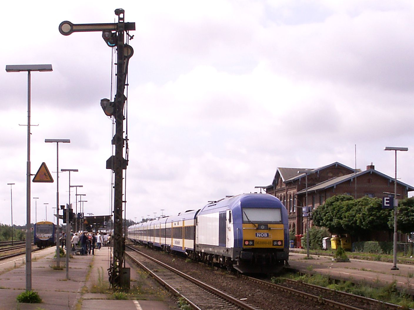 Bf Niebuell